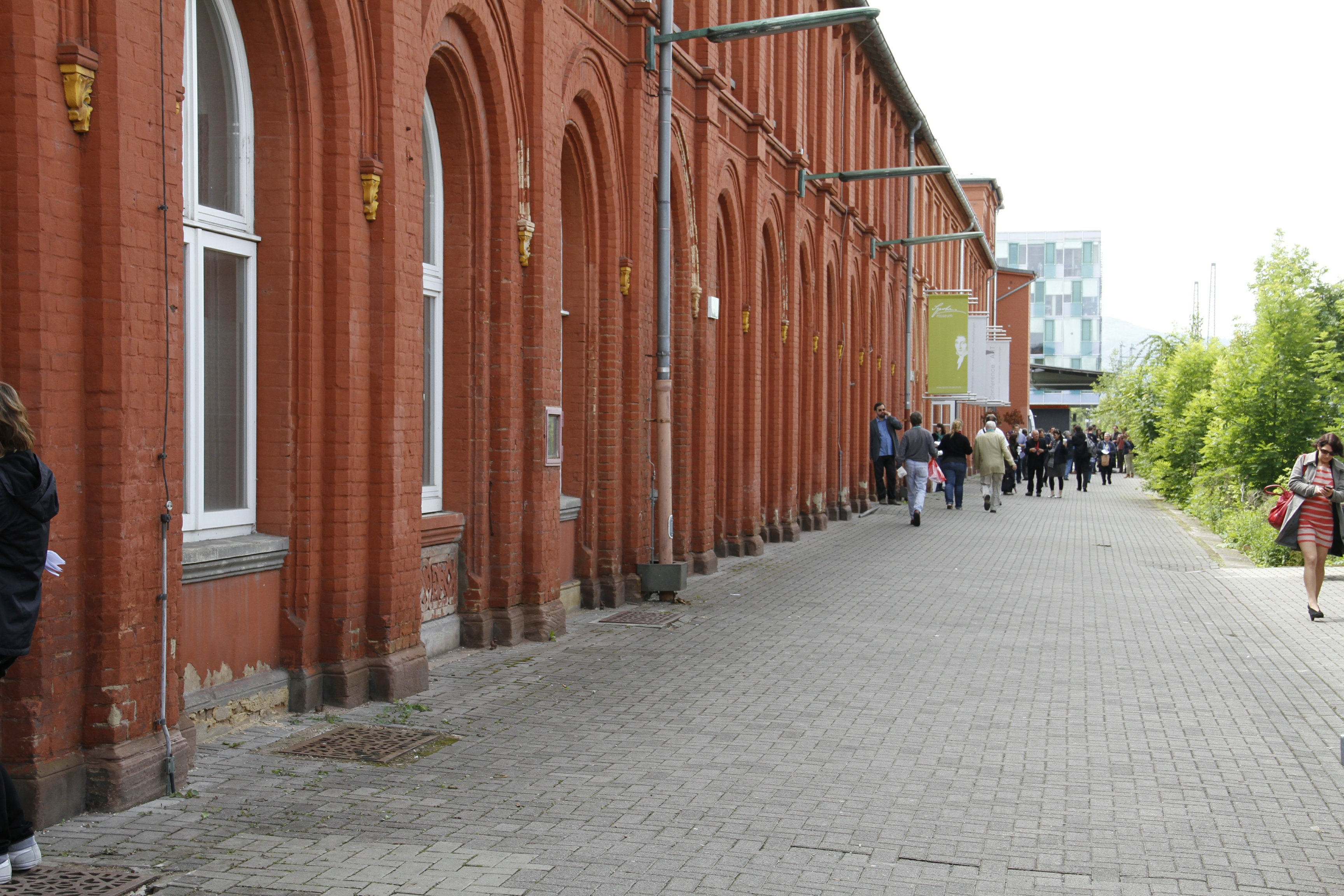 dOCUMENTA(13) Veranstaltungsgebäude Hauptbahnhof Kassel - Südflügel